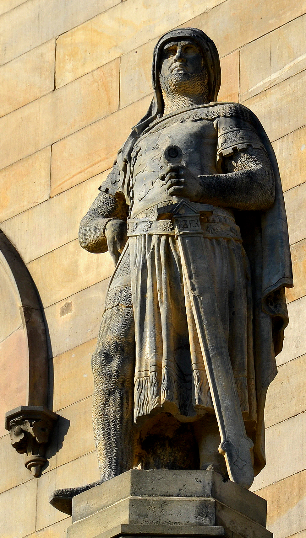 Die Skulptur des Heinrichs des Löwens auf der Balkon-Balustrade über dem Haupteingang des Welfenschlosses eröffnet den Reigen der im 1. Stock der Schlossfassade insgesamt 8 dargestellten Herrscher aus dem Hauses der Welfen . Die Figur, hier dargestellt mit Kettenrüstung und Ritterschwert, wurde nach dem Entwurf durch den Bildhauer Wilhelm Engelhard um 1862 geschaffen ...